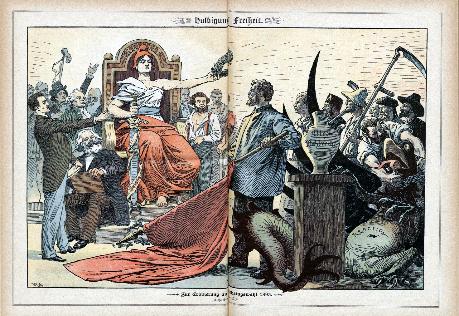 "Huldigung der Freiheit. Zur Erinnerung an die Reichstagswahl 1893", in: Der Wahre Jacob, Nr. 183, 29.7.1893, S. 1516 f.